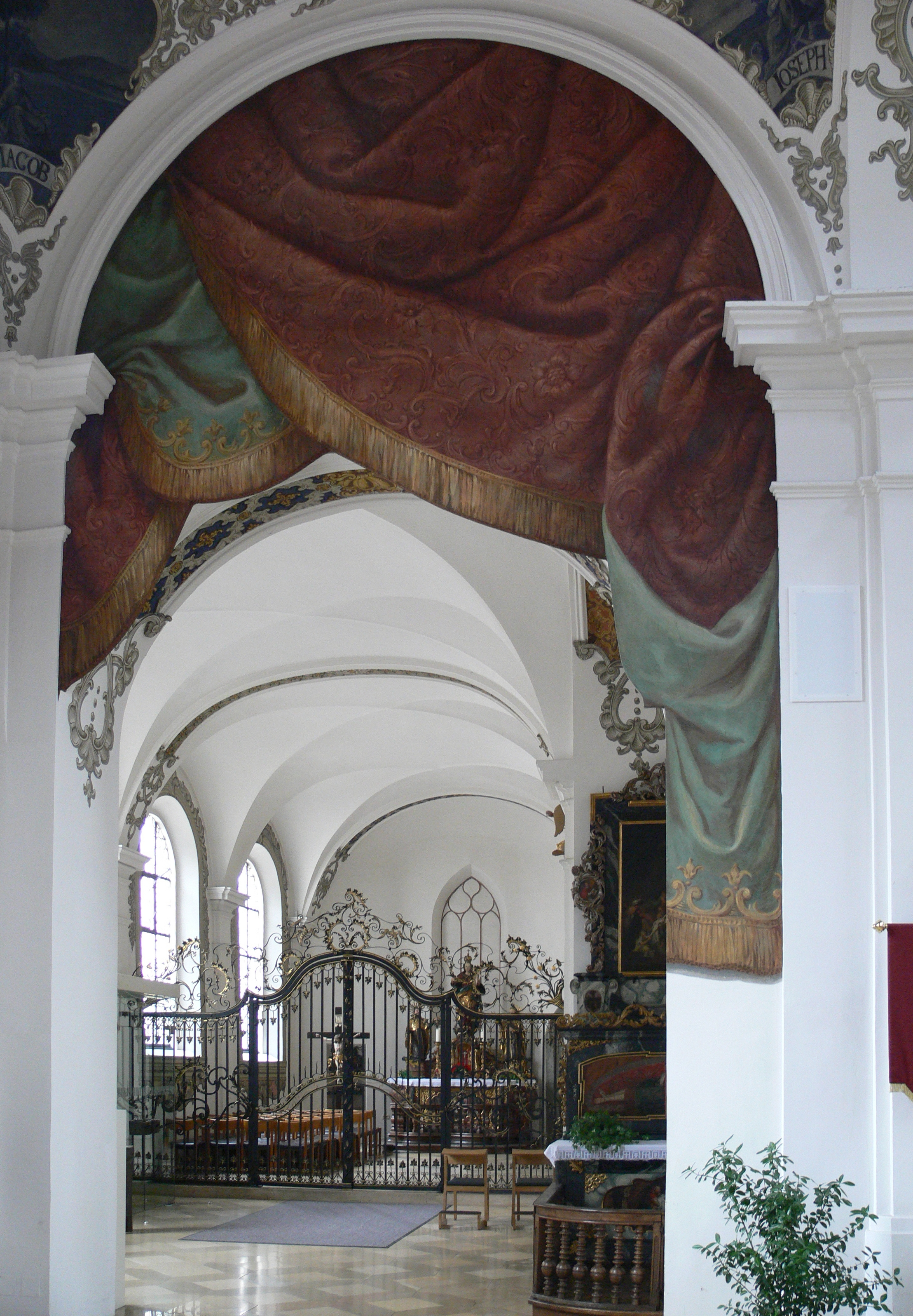 Stadtpfarrkirche St. Martin, Biberach an der Riß Blick in die Marienkapelle